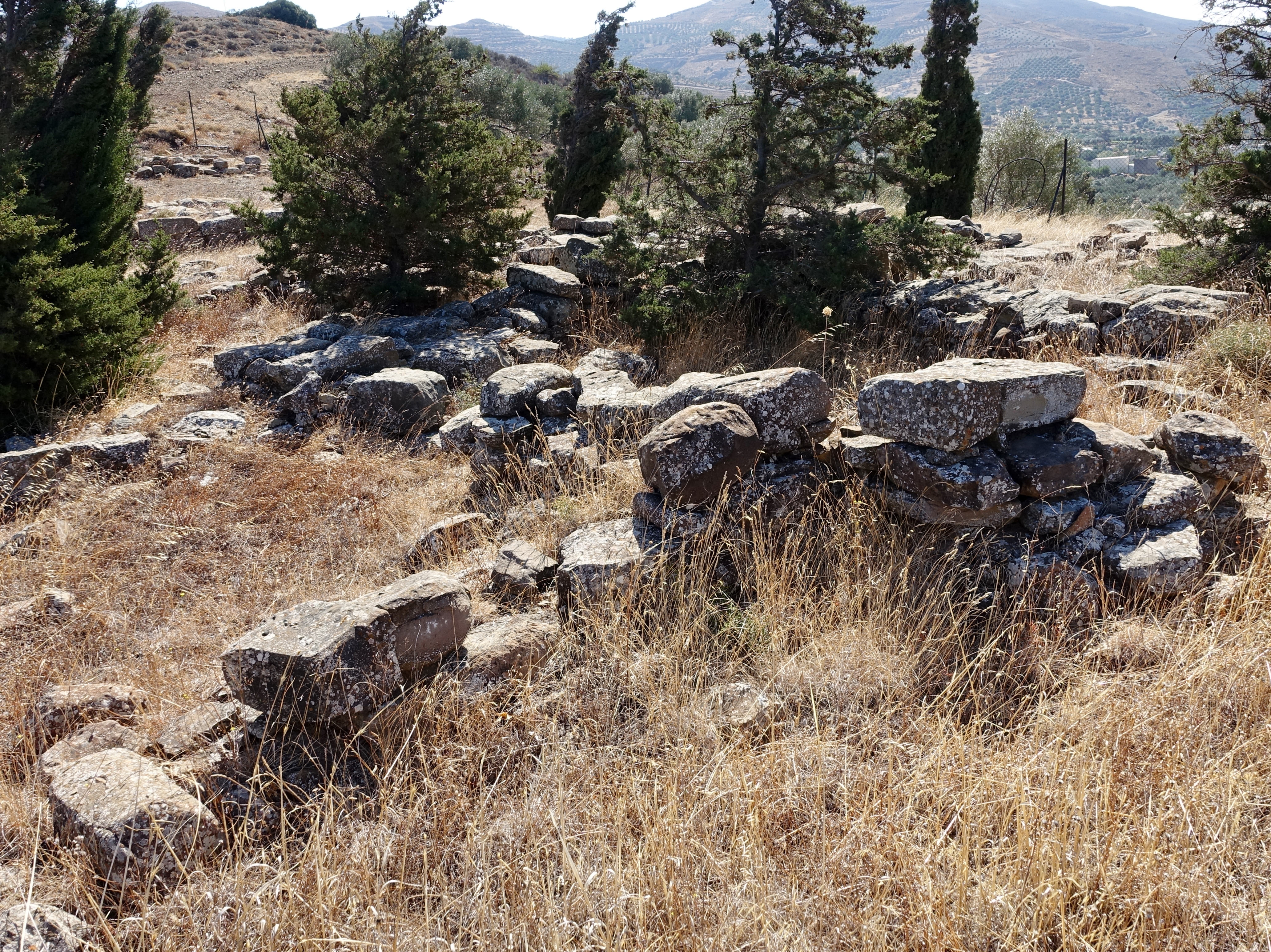 Ausgrabungsstätte von Kephala (Κεφάλα) bei Chondros (Χόνδρος), Gemeinde Viannos, Regionalbezirk Iraklio, Kreta, Griechenland